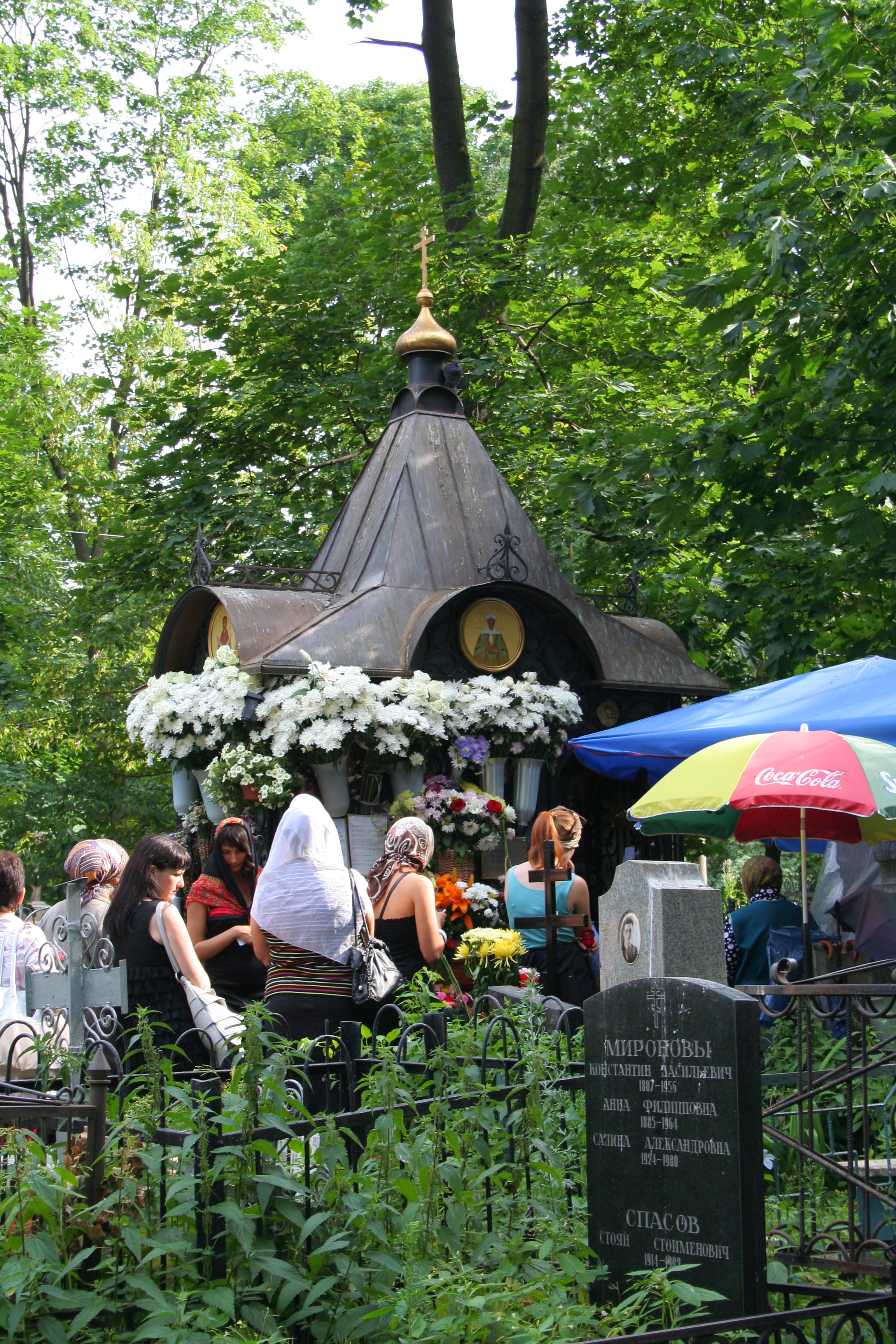 Ehemaliges Grab der Heiligen Matrona von Moskau, bis heute eine Pilgerstätte.